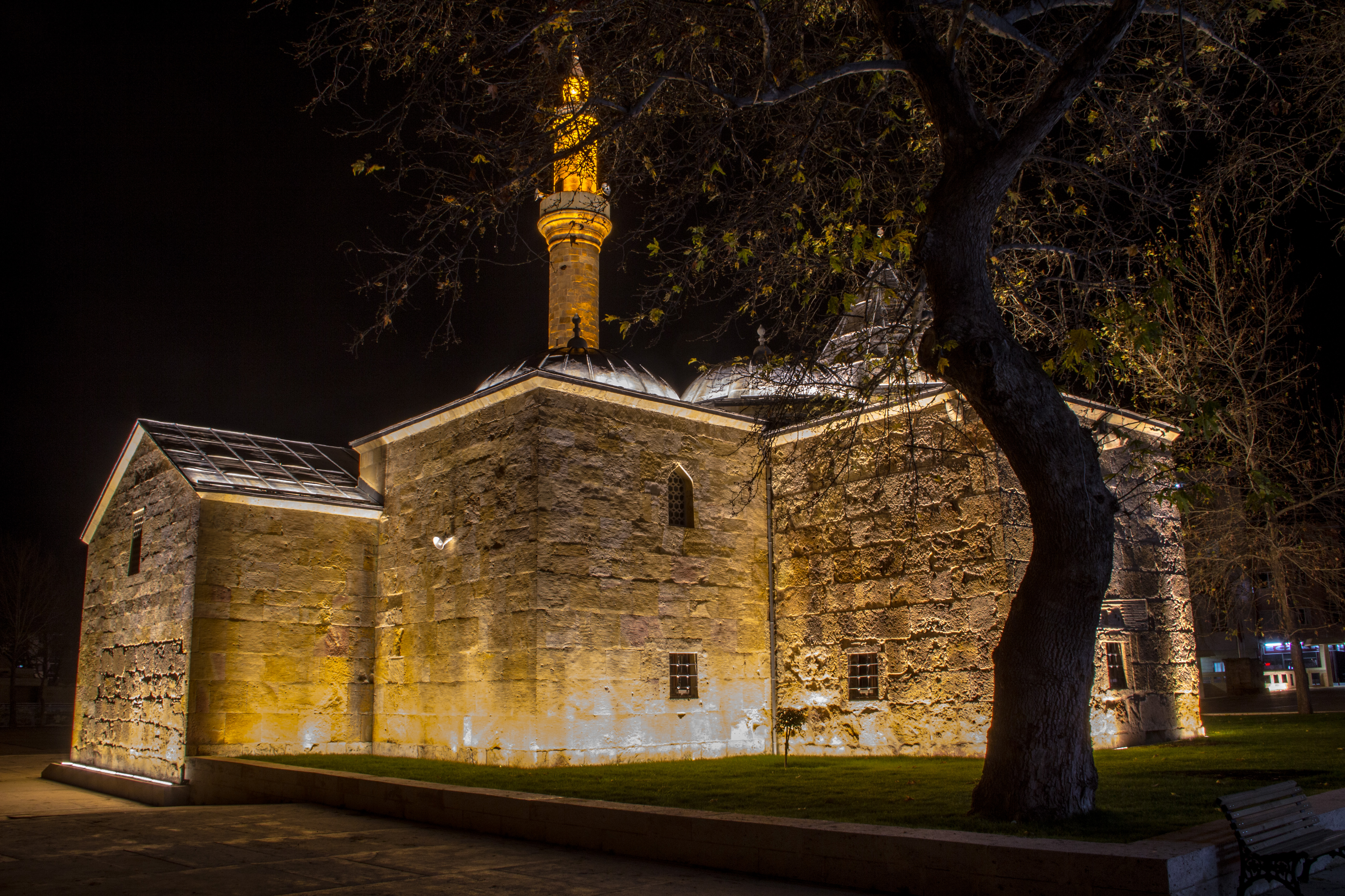 Ahi Evran Mosque